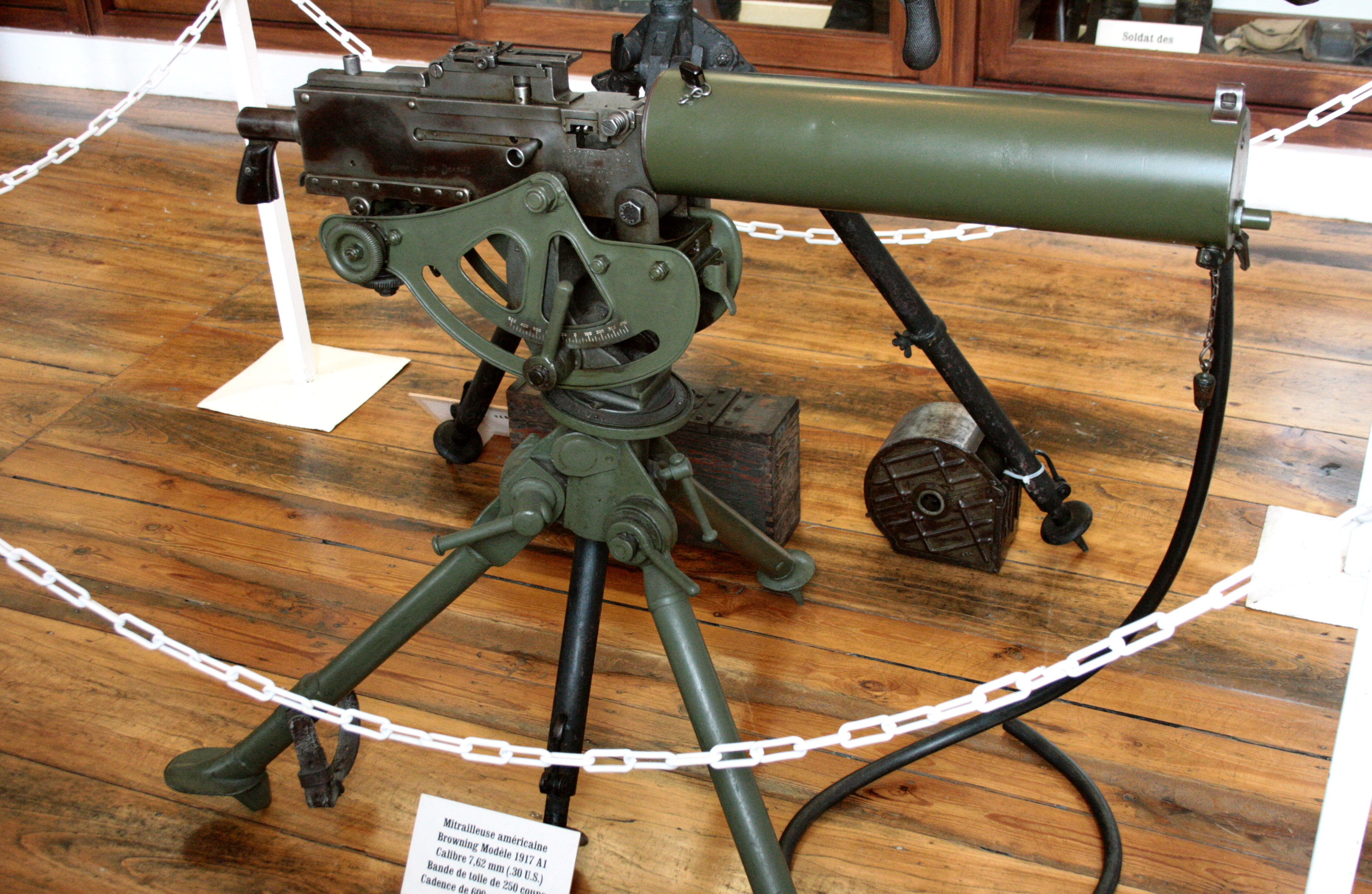 Musée d'Armes et d'Histoire militaire, rue Roc Saint-Nicaise 59-61, Tournai (Belgique). Mitrailleuse M1917 Browning